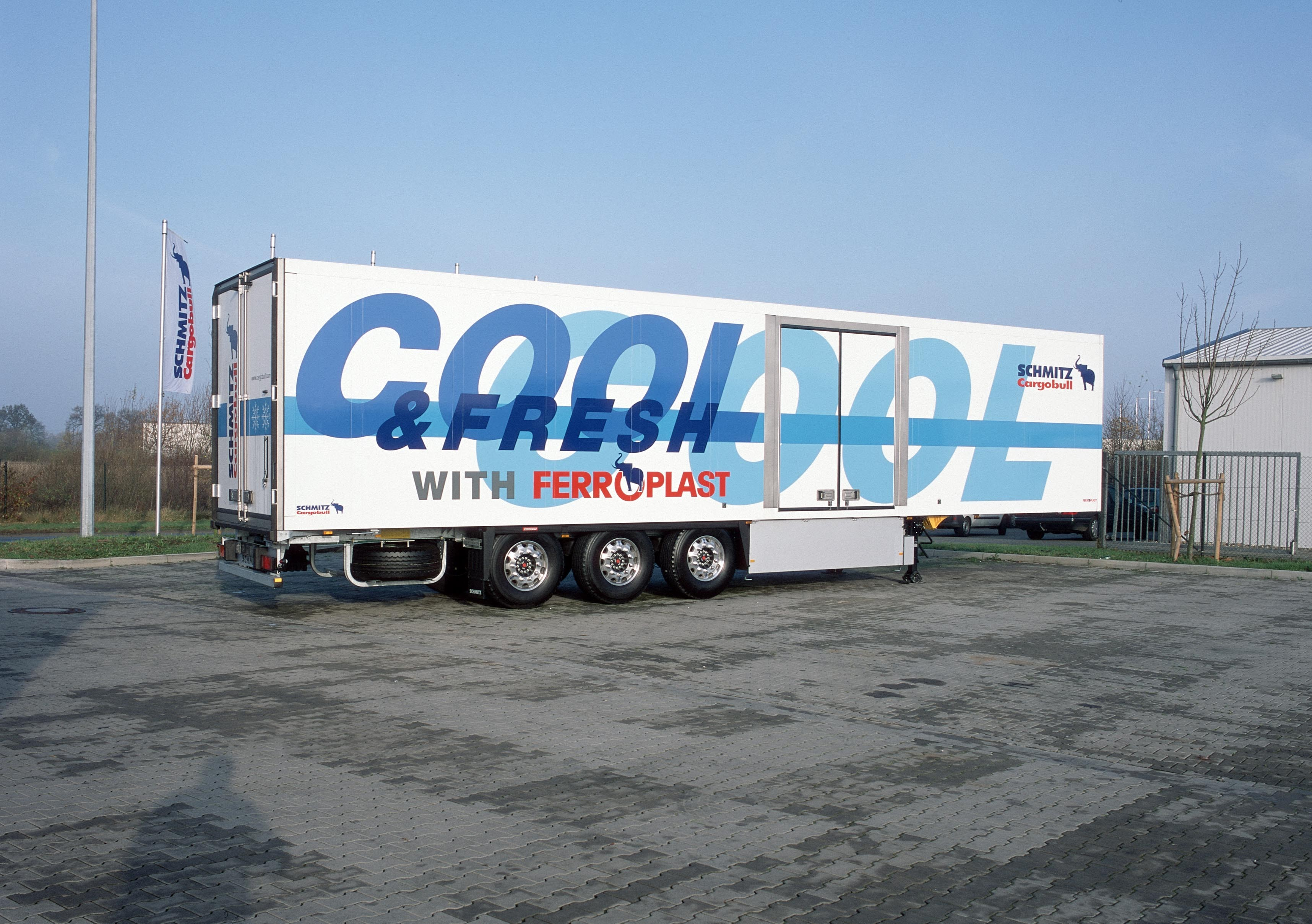 Chladiarenský náves Schmitz Cool & Fresh